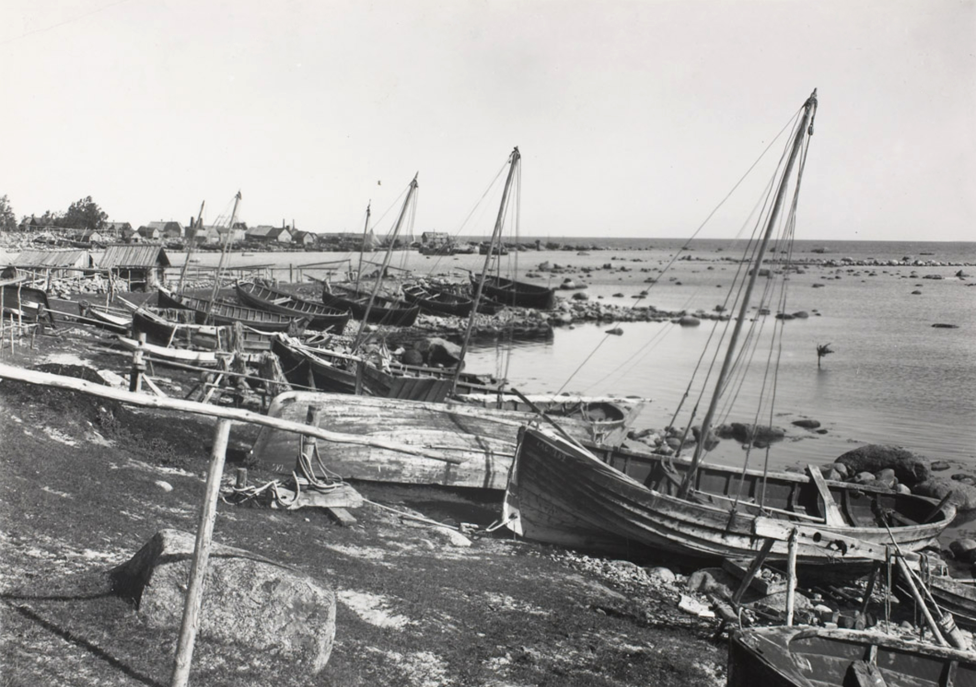 Prangli sadam